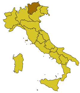 Karte Italiens, Trentino-Südtirol hervorgehoben